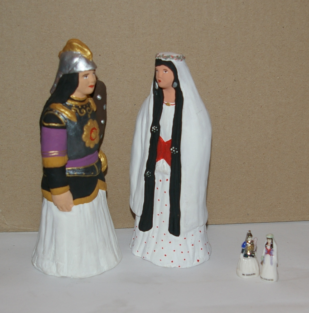 Santons et fèves aux effigies des géants d'Ath